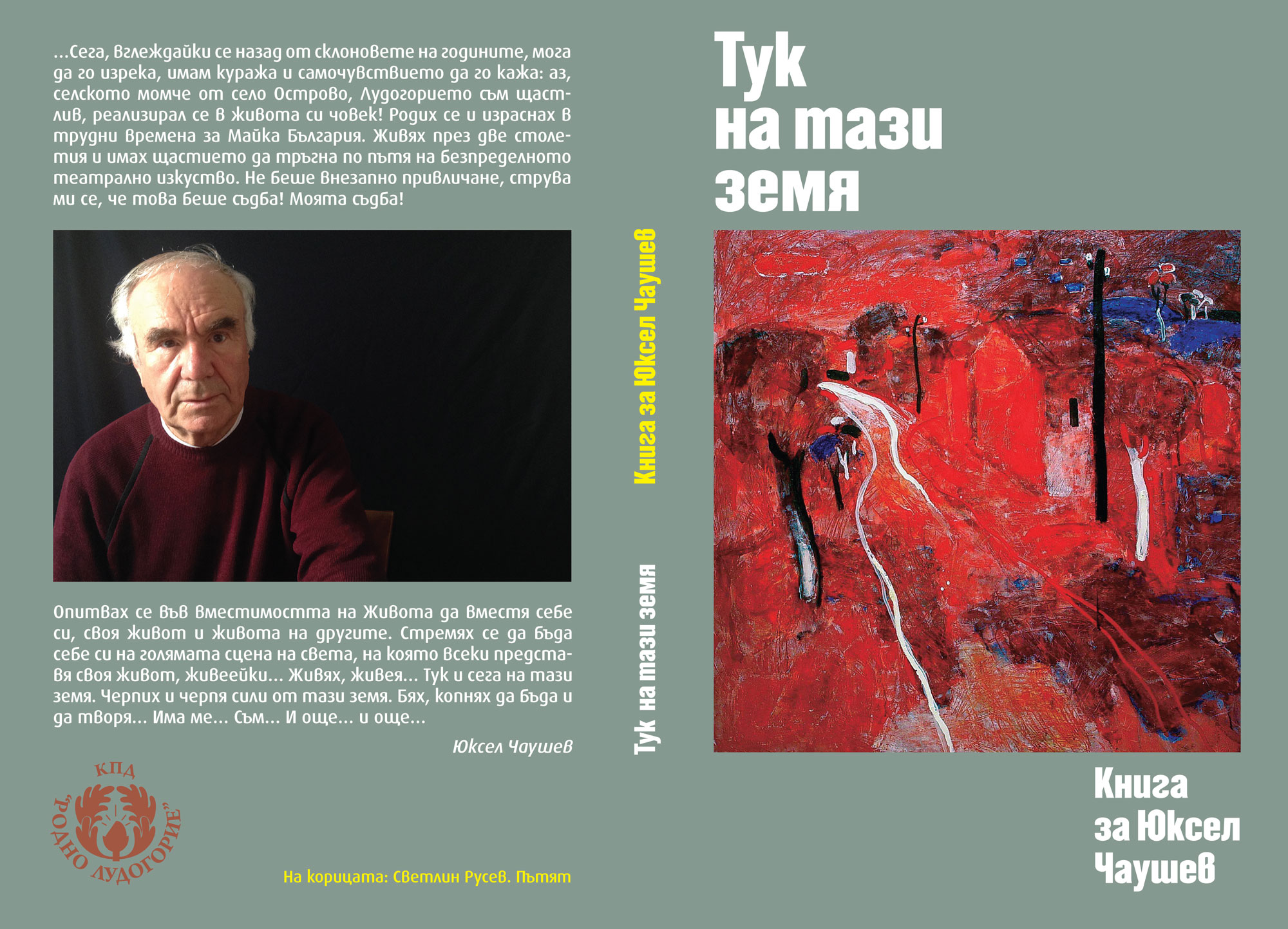 Тук на тази земя